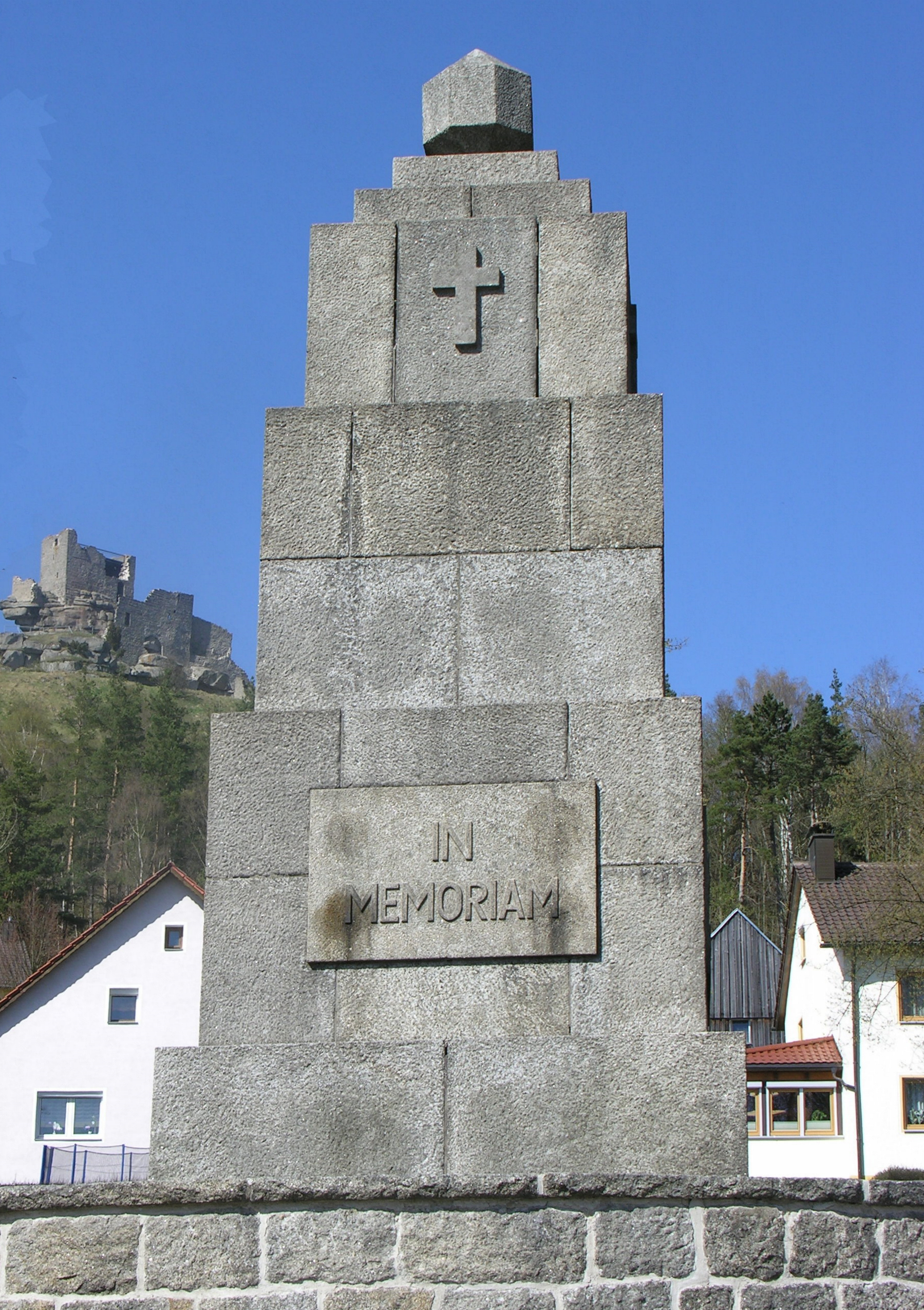 Flossenbürg Gefallenen-Gedenkstein vor Burg Flossenbürg Oberpfalz Bayern - Foto Wolfgang Pehlemann DSCN7758